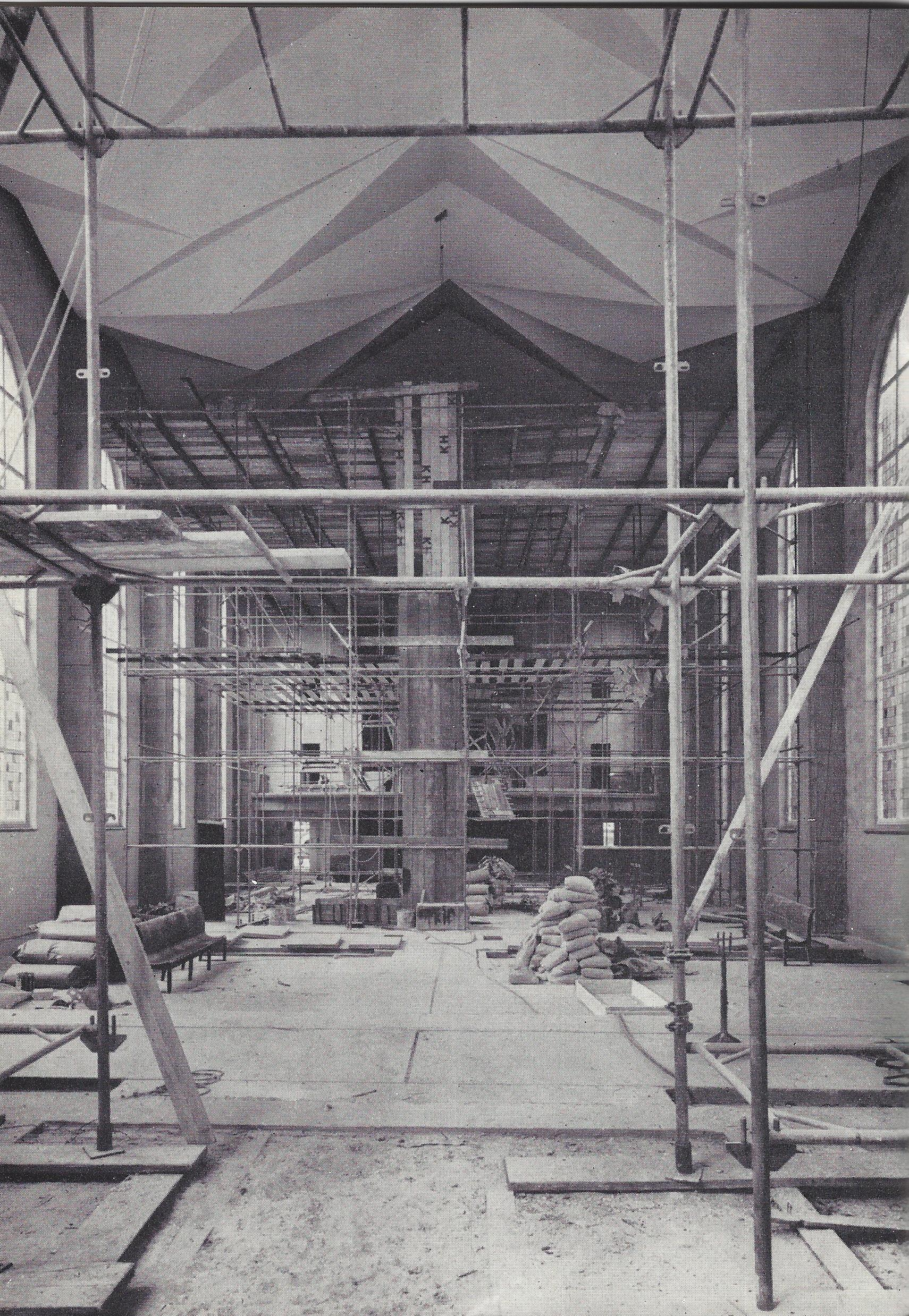 Einbau der Faltdecke (Jan Niklas Franzius) in den Innenraum der wiederaufgebauten Bürgermeister-Smidt-Gedächtniskirche